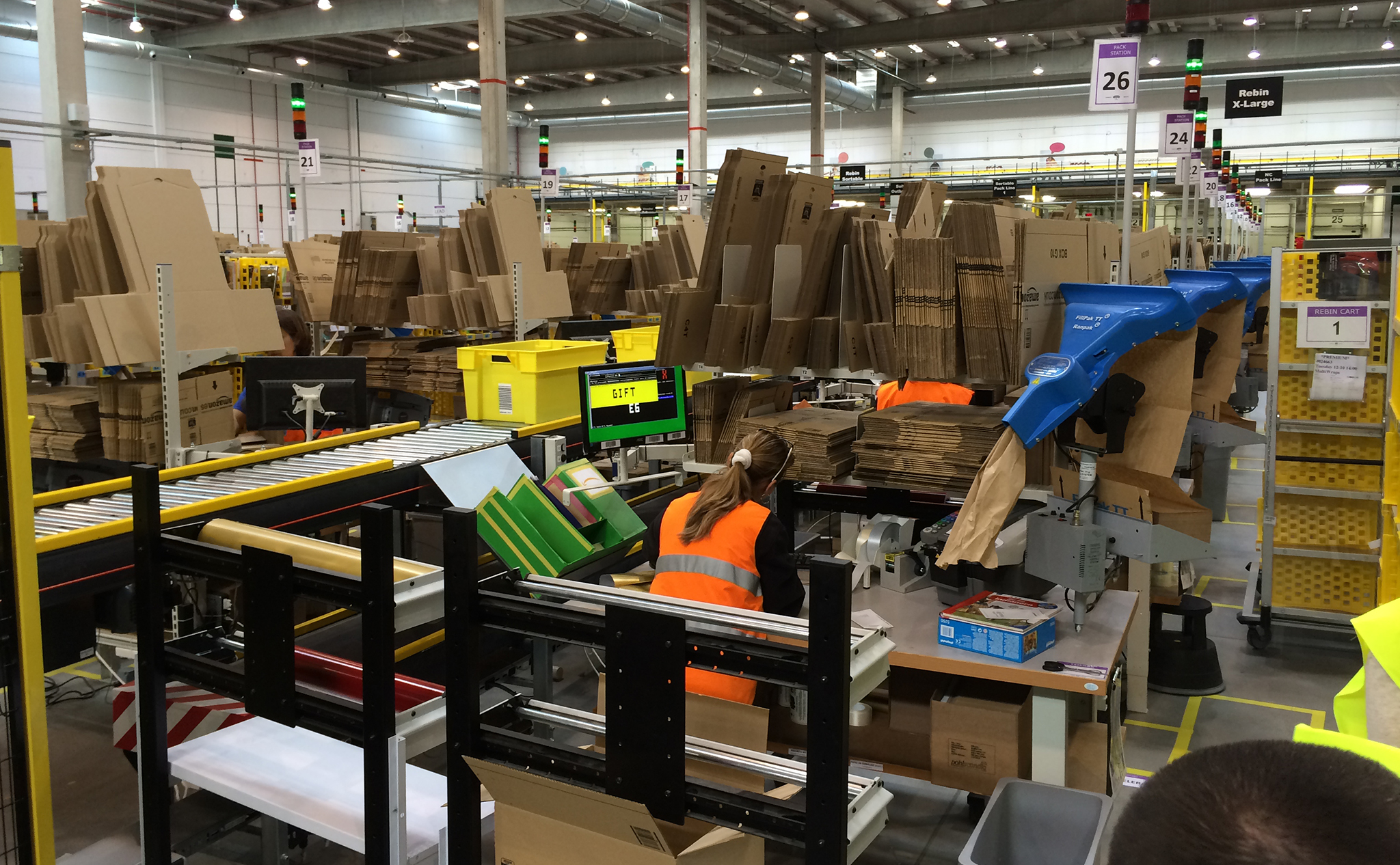 Una visita al gigantesco Centro Logístico de Amazon España en San Fernando de Henares (Madrid)